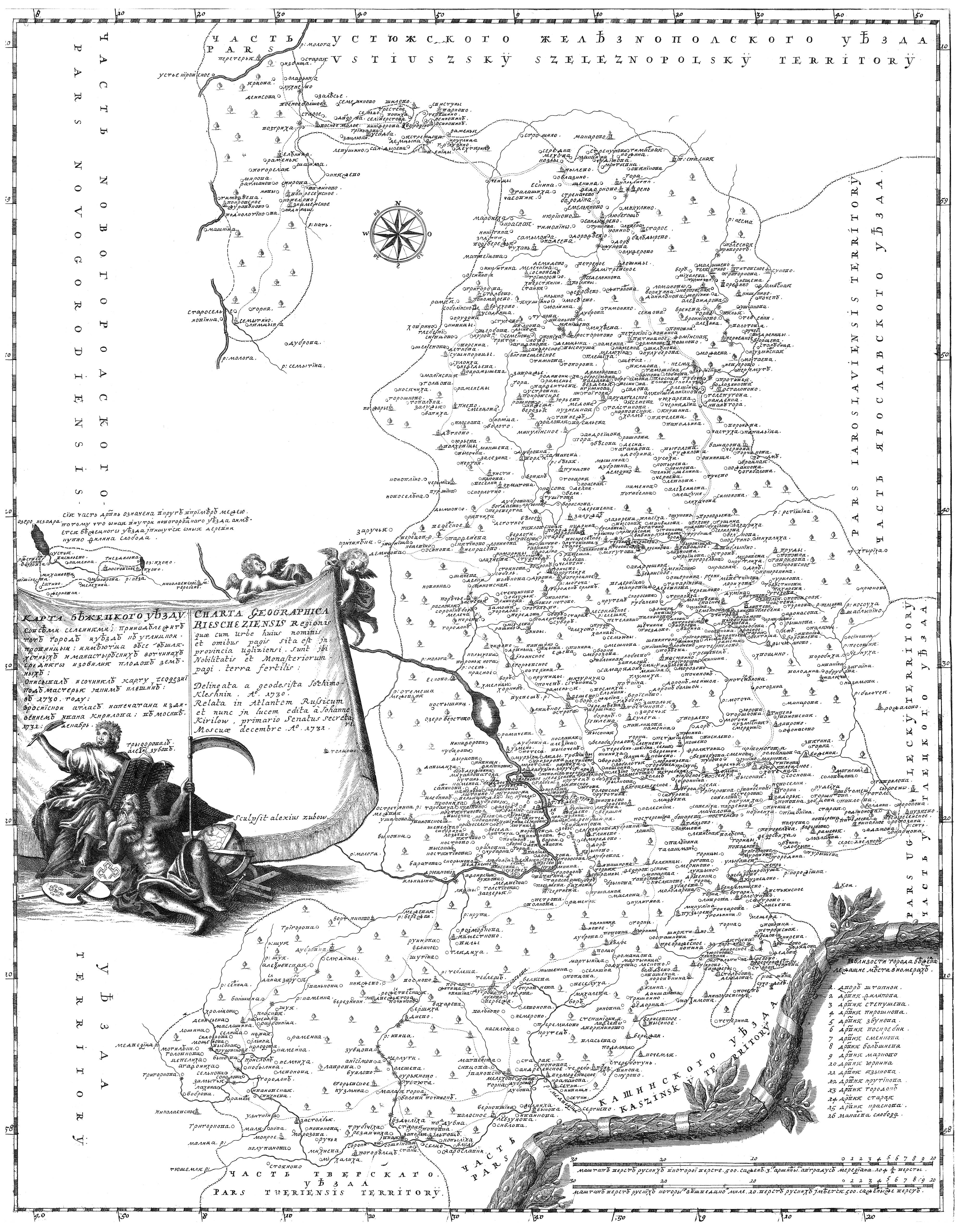 Бежецкий уезд в «Атласе Всероссийской империи» И. К. Кириллова. 1722-1737 гг.